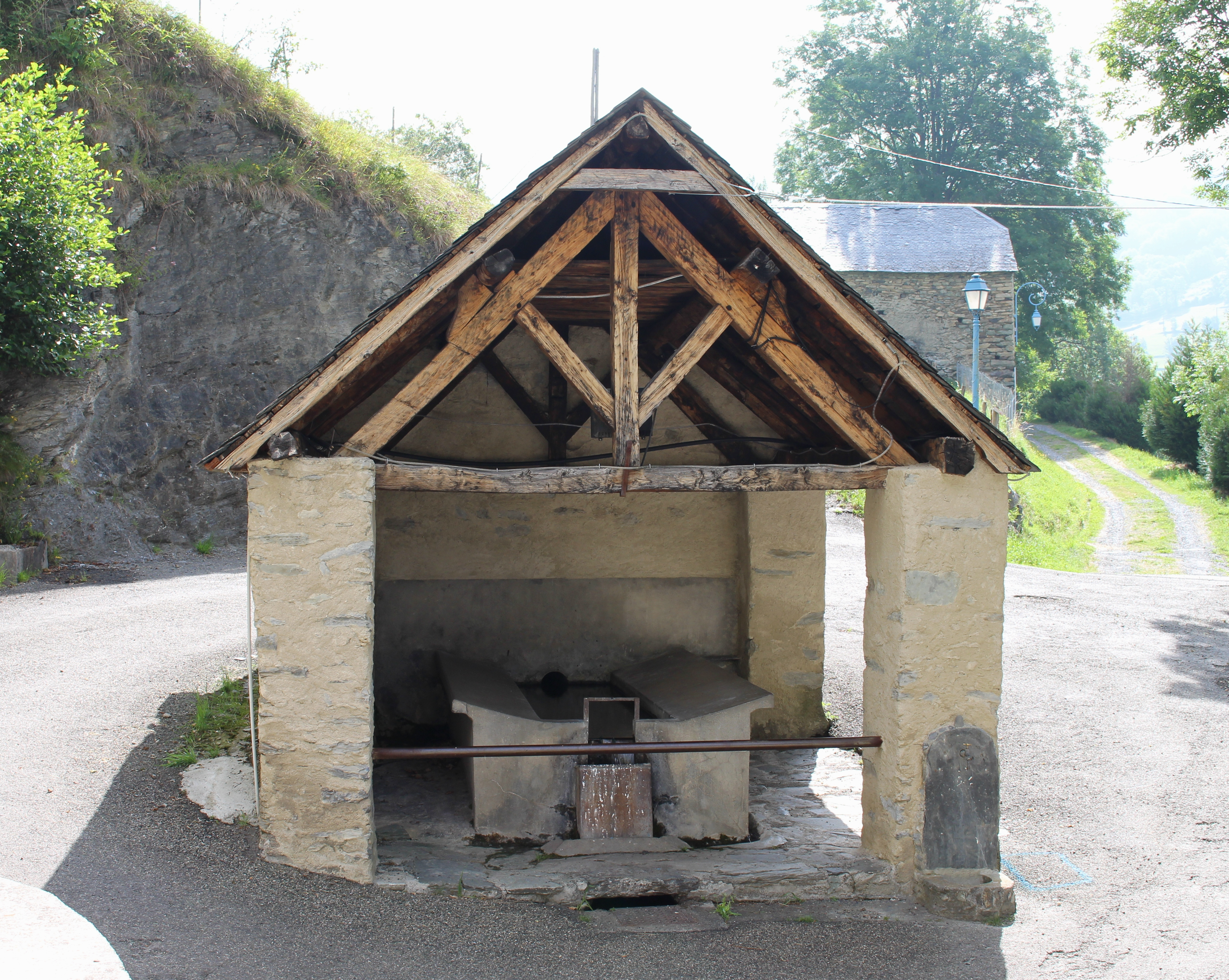 Lavoir de Viey (Hautes-Pyrénées)